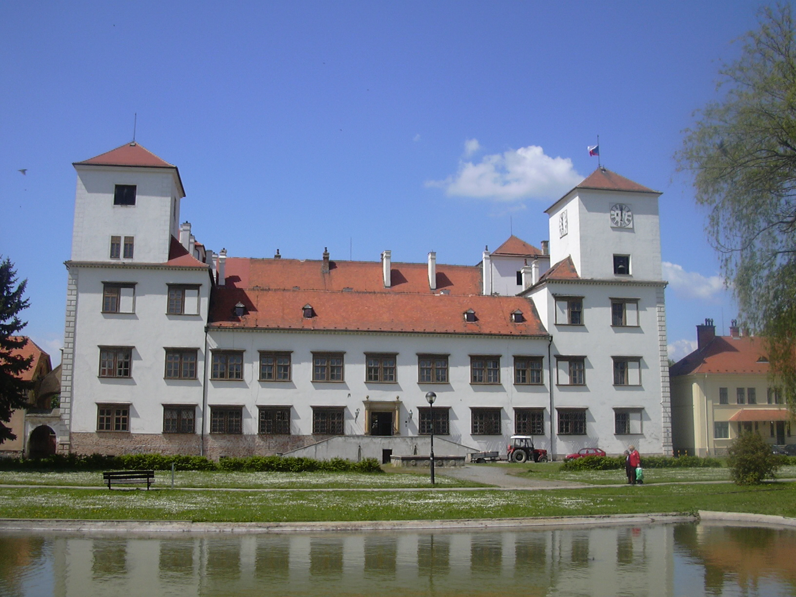 Státní zámek Bučovice (Vyškov District - Czech republic)